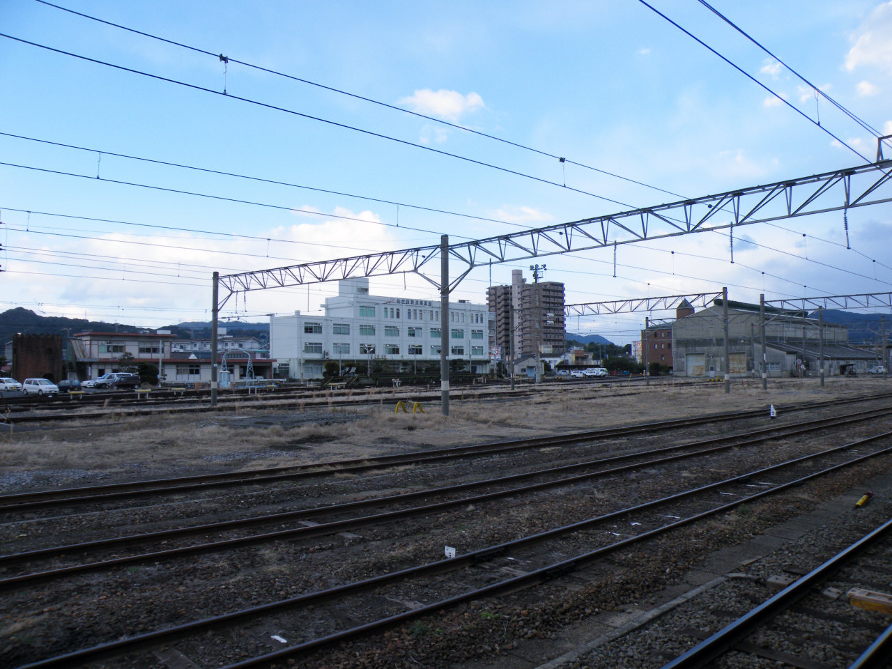 JR九州佐世保鉄道事業部佐世保運輸センター（早岐駅ホームより）